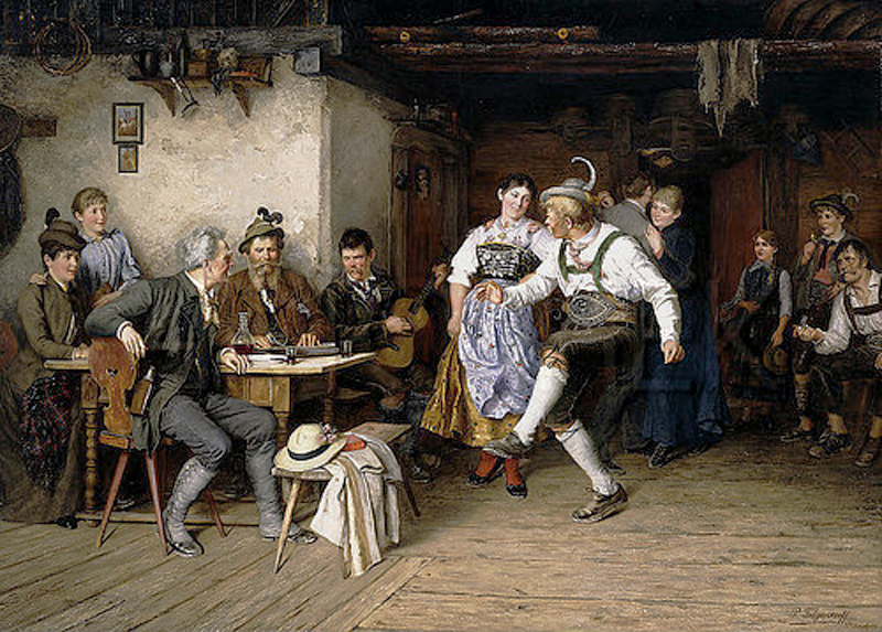 In der Weinstube